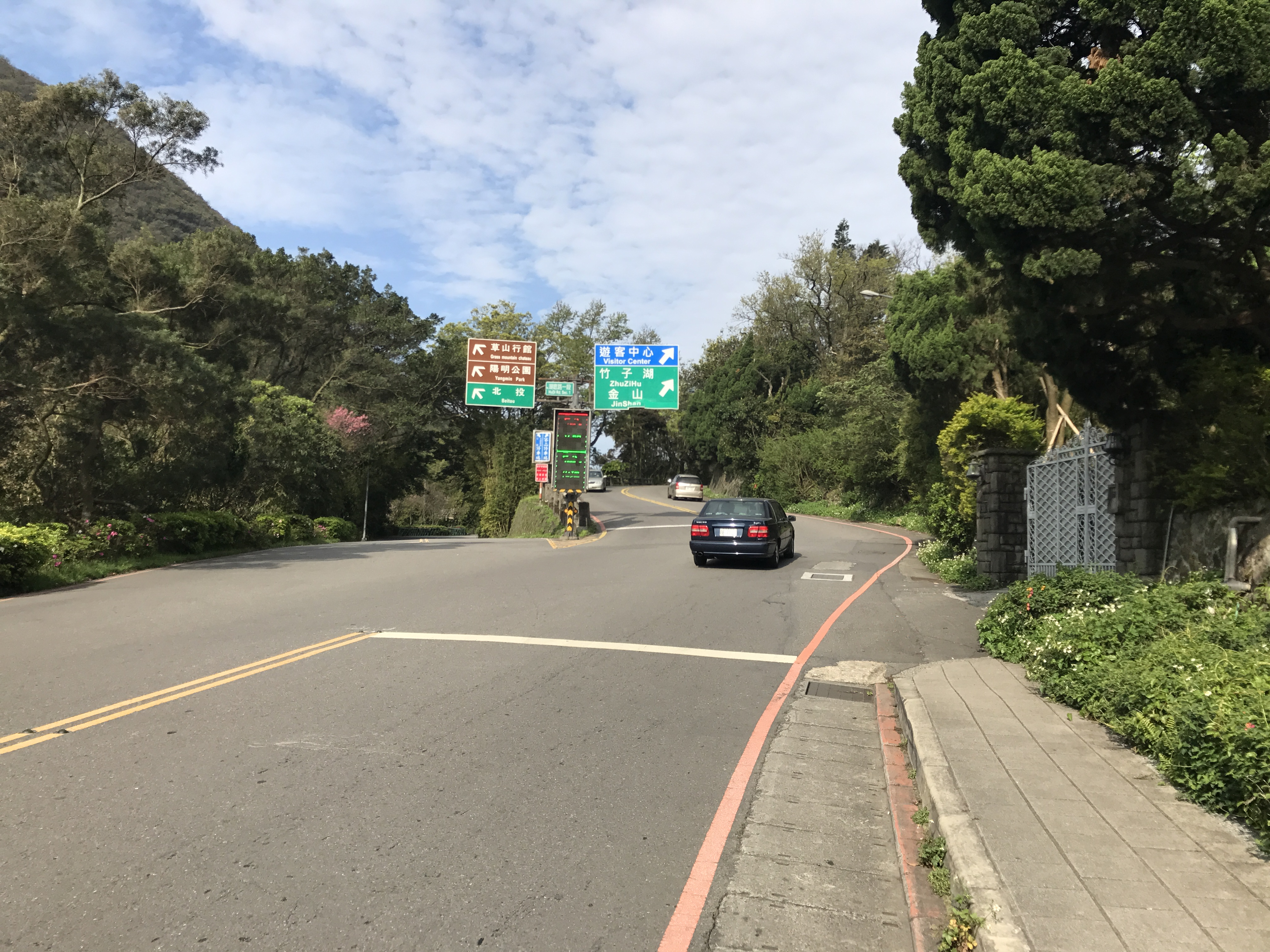 中文（台灣）: 台2甲線 陽金公路與湖山路交叉路口